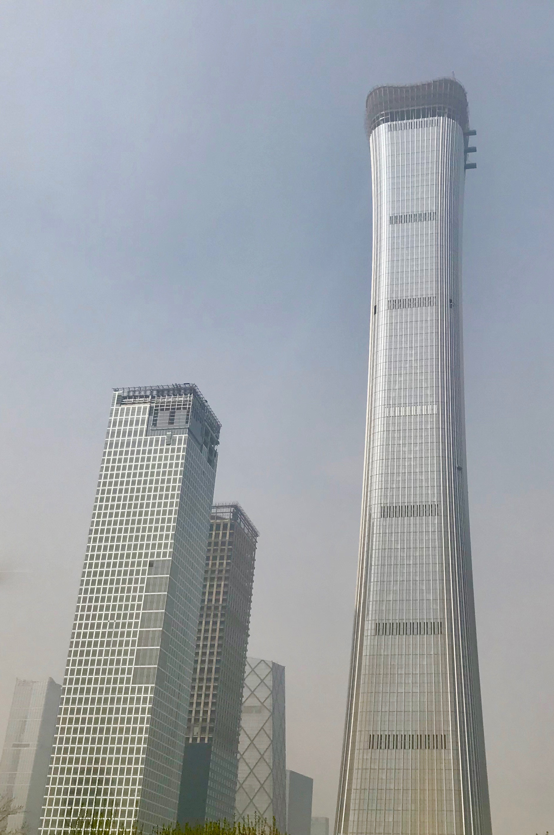 China Zun och Samsung China Headquarters i Peking april 2018